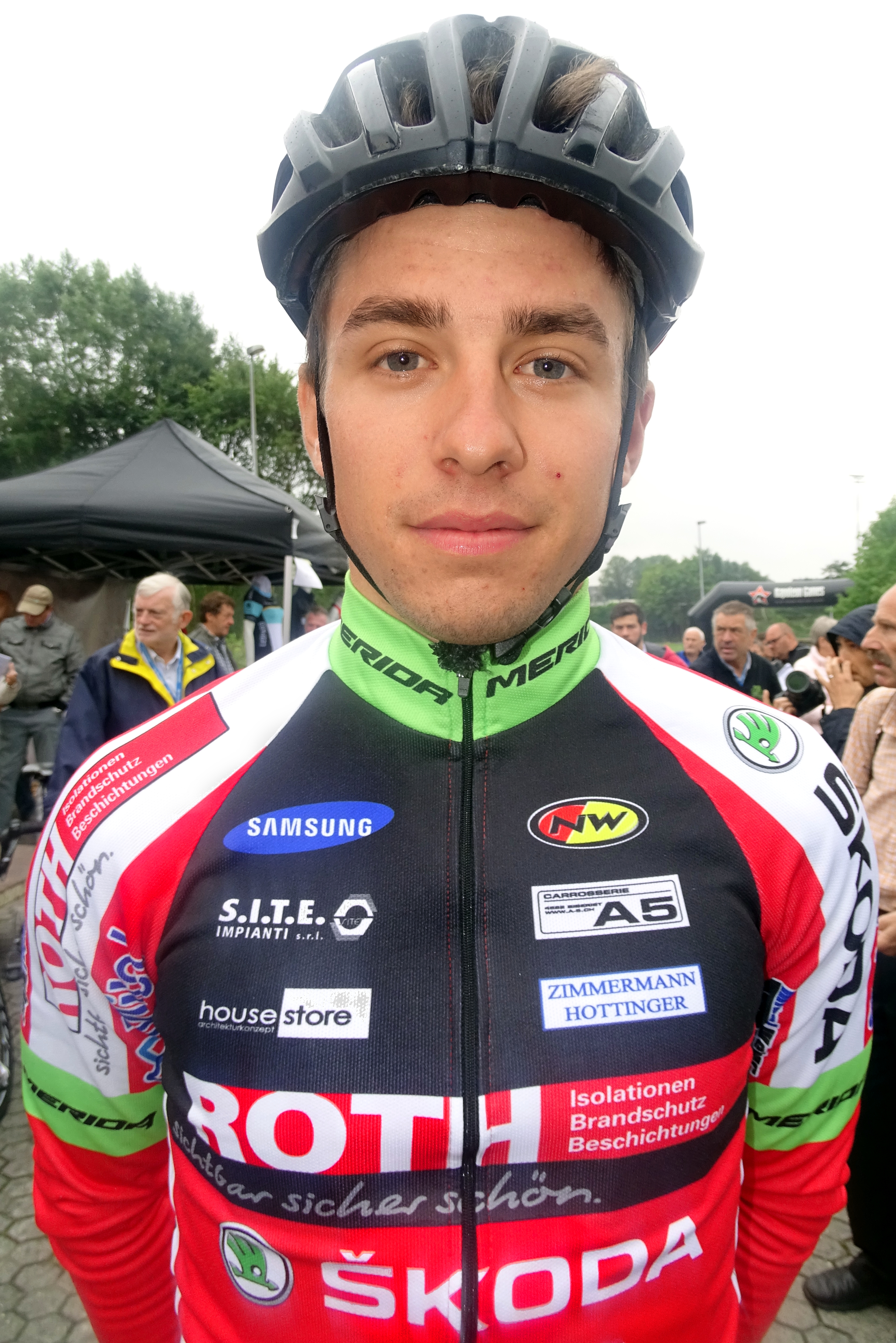 Reportage réalisé le mardi 18 août à l'occasion du départ et de l'arrivée du Grand Prix de la ville de Zottegem 2015 à Zottegem, Belgique.